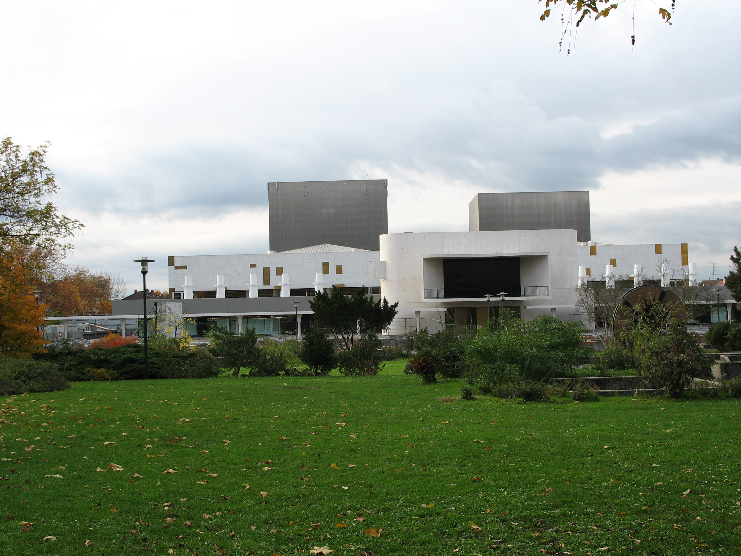 Außenansicht des Staatstheaters Darmstadt, Ostseite